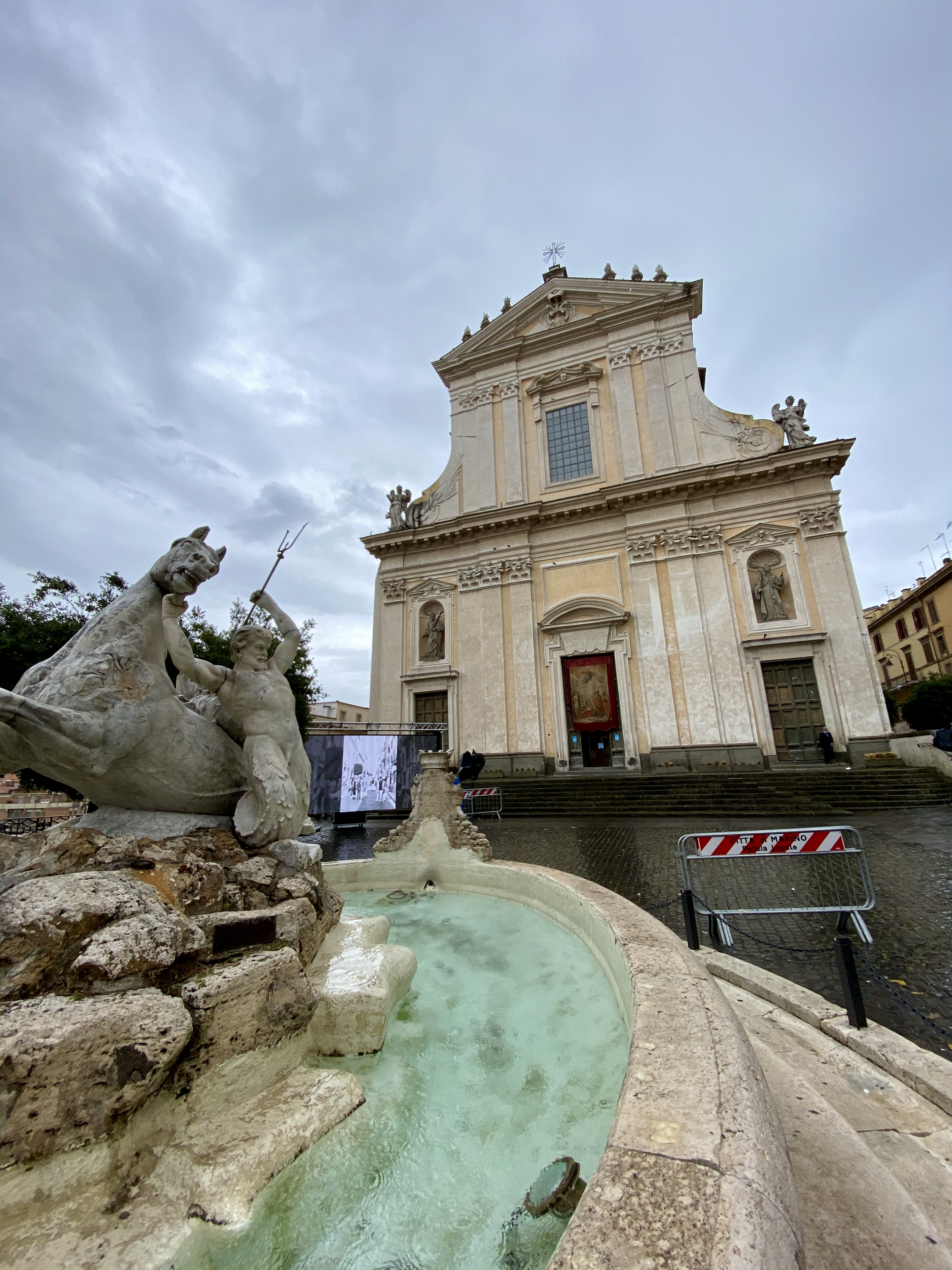 Facciata della basilica di San Barnaba a Marino